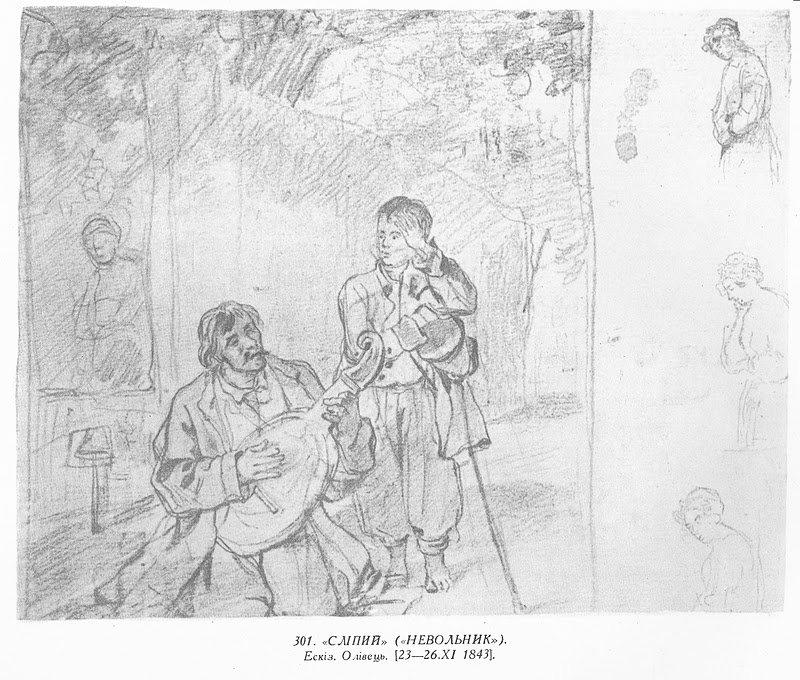 зворот Автопортрета, 1843